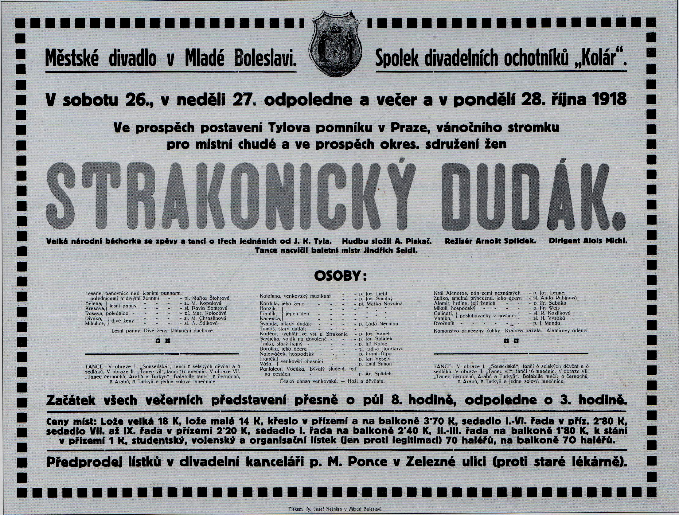 Plakát ke slavnostnímu představení na oslavu vzniku Československé republiky - ochotnický soubor Kolár, Městské divadlo Mladá Boleslav